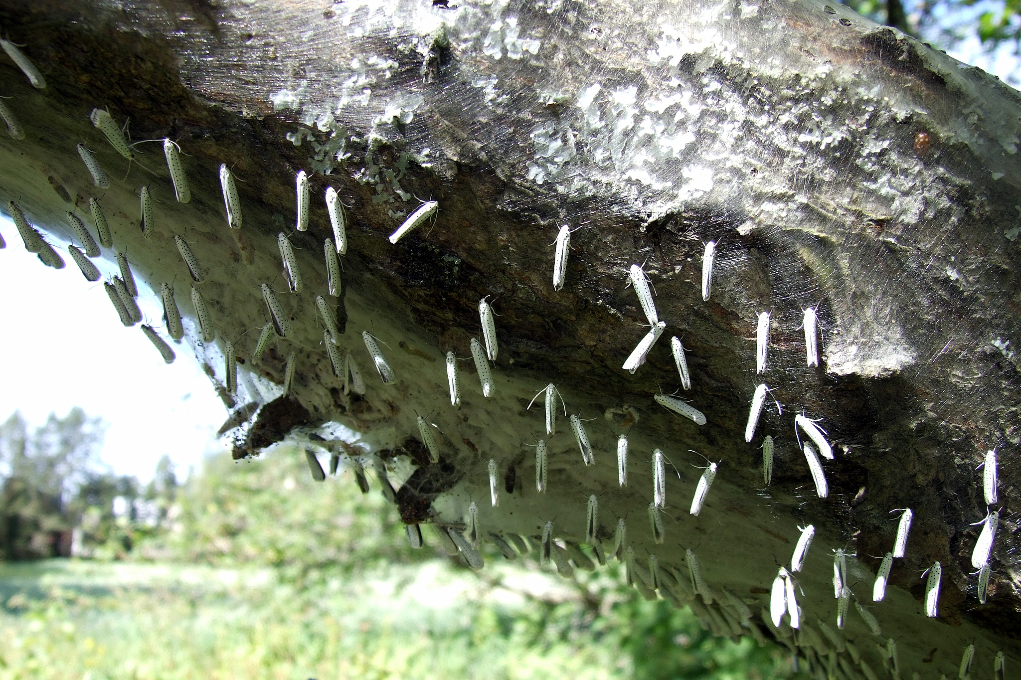 Bird-Cherry Ermines (Yponomeuta evonymella) in Oulu, Finland.